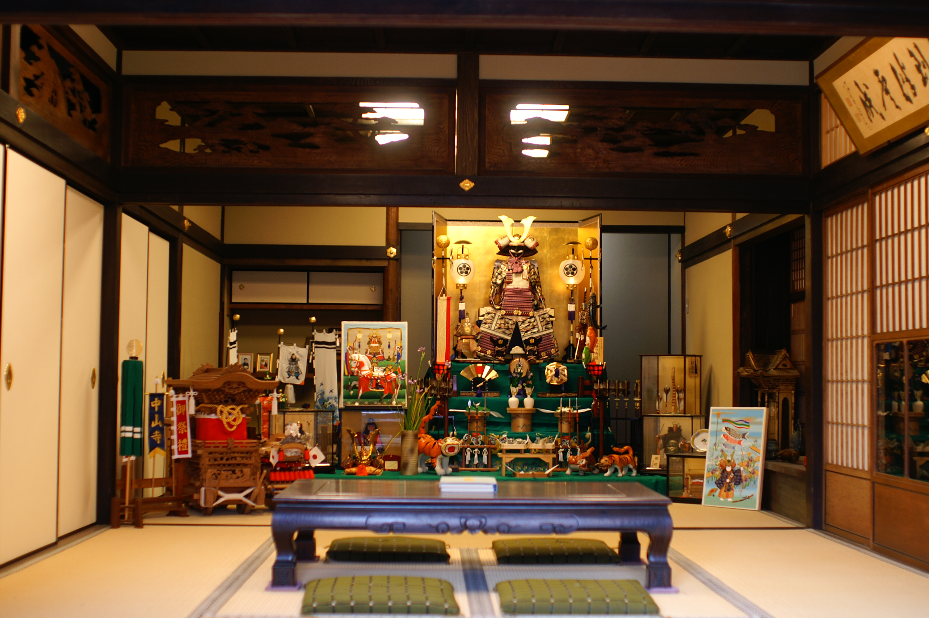 中山寺総持院に飾られていた五月人形。